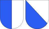 Wappen des Kantons Luzern und Wappen des Kantons Zürich